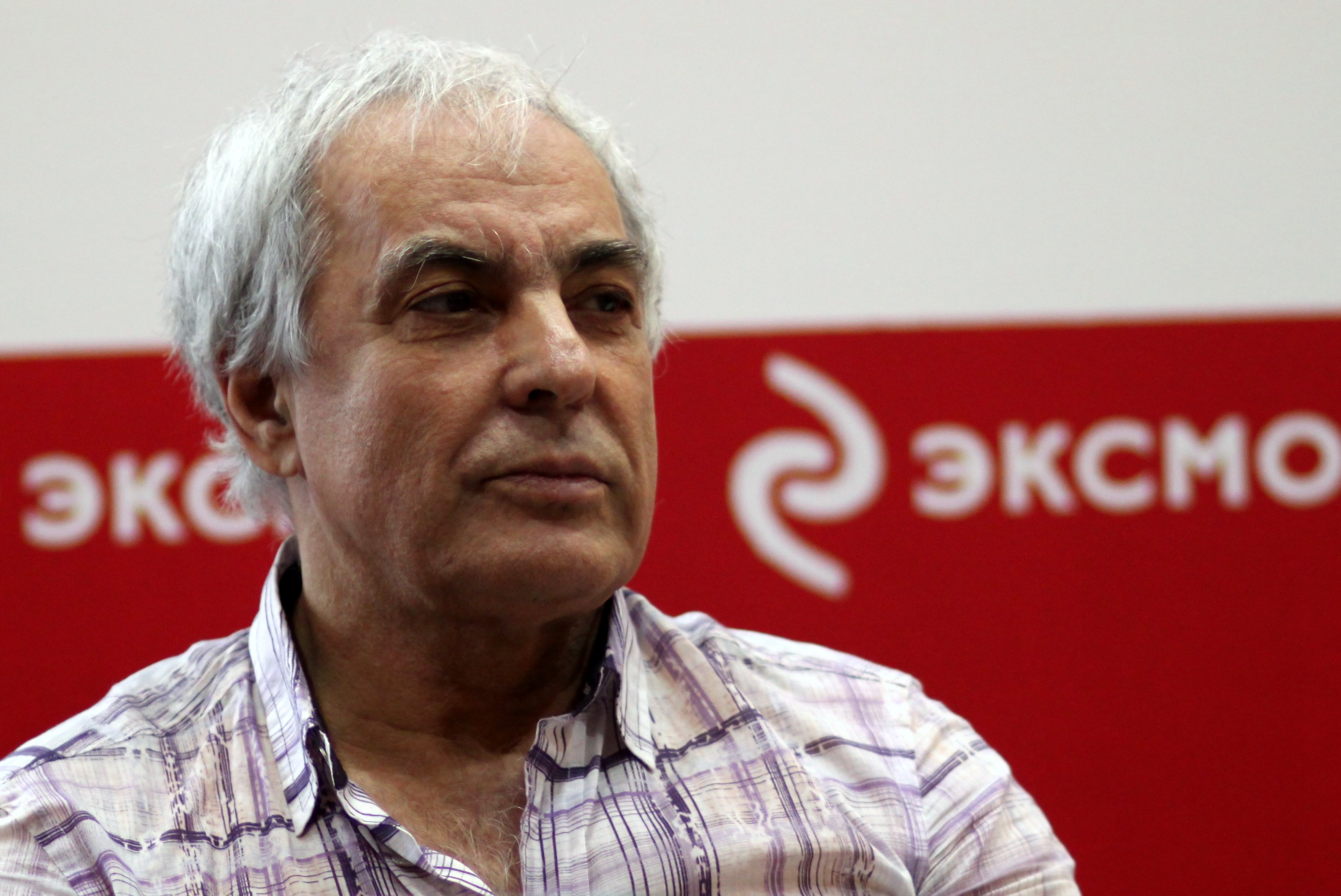 Yury Nikitin